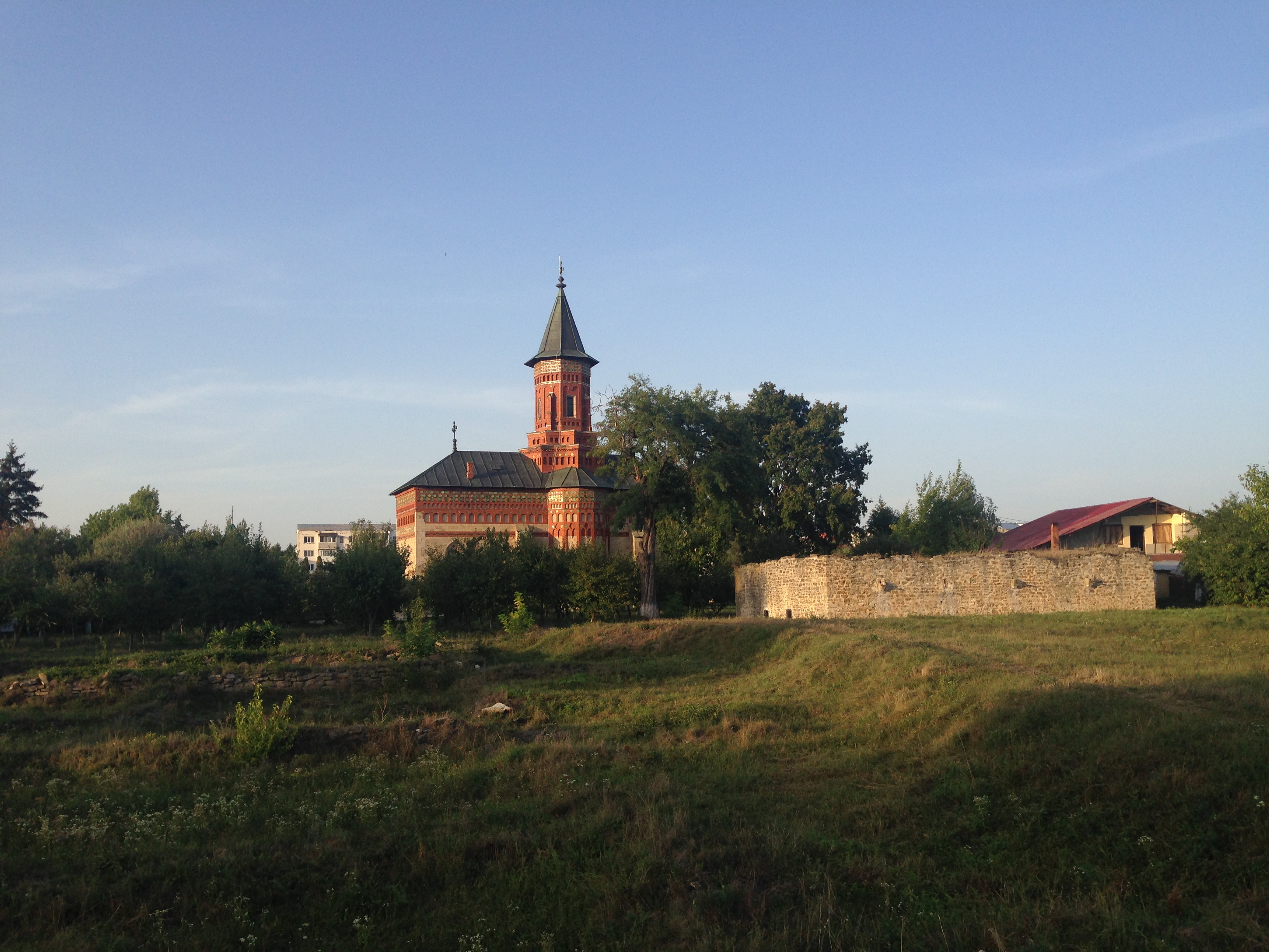 În spatele bisericii a existat o curte domnească unde poposea Ștefan cel Mare.